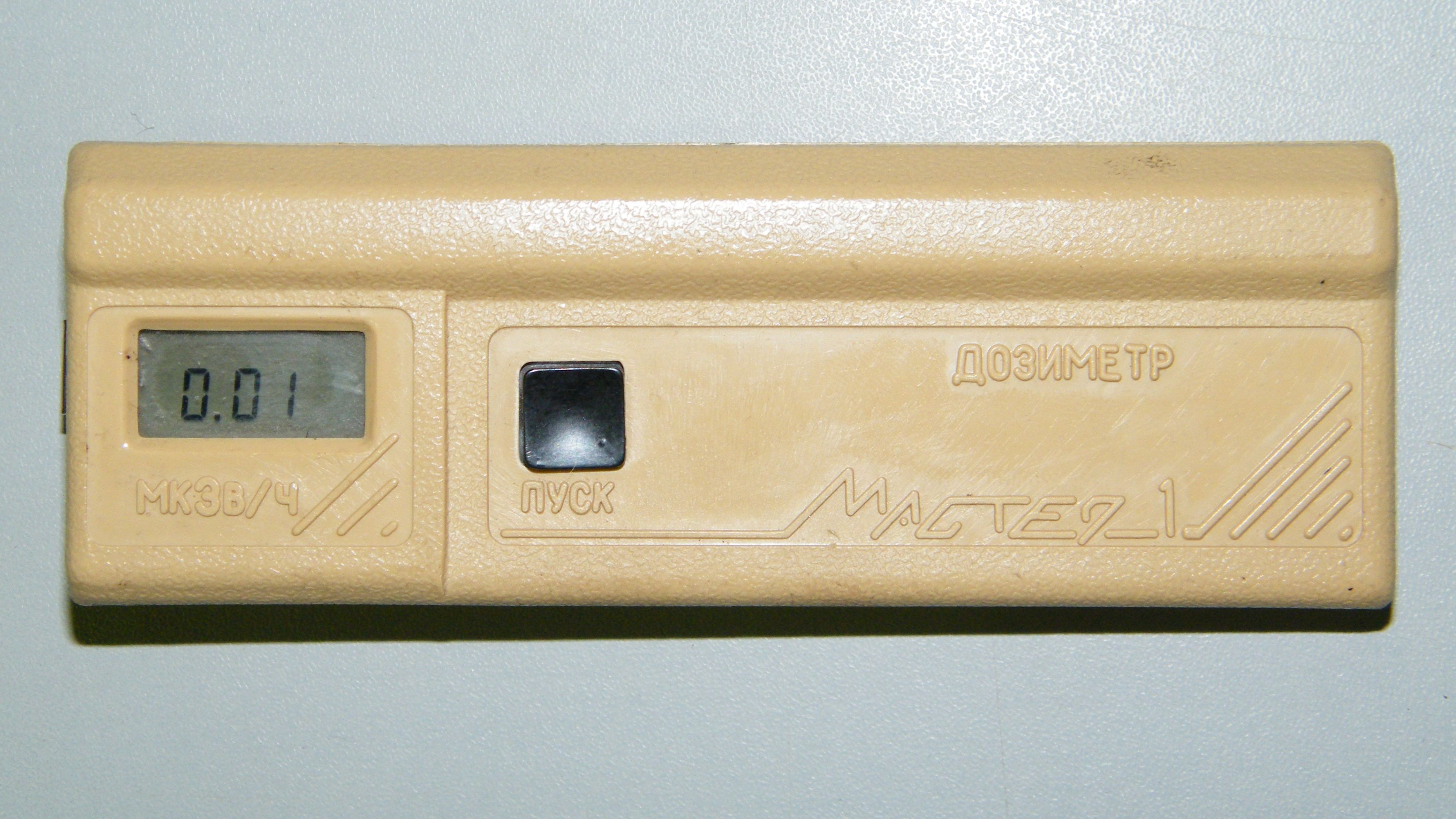 Дозиметр Мастер-1, Владивостокский завод Варяг, начало 1990-х гг